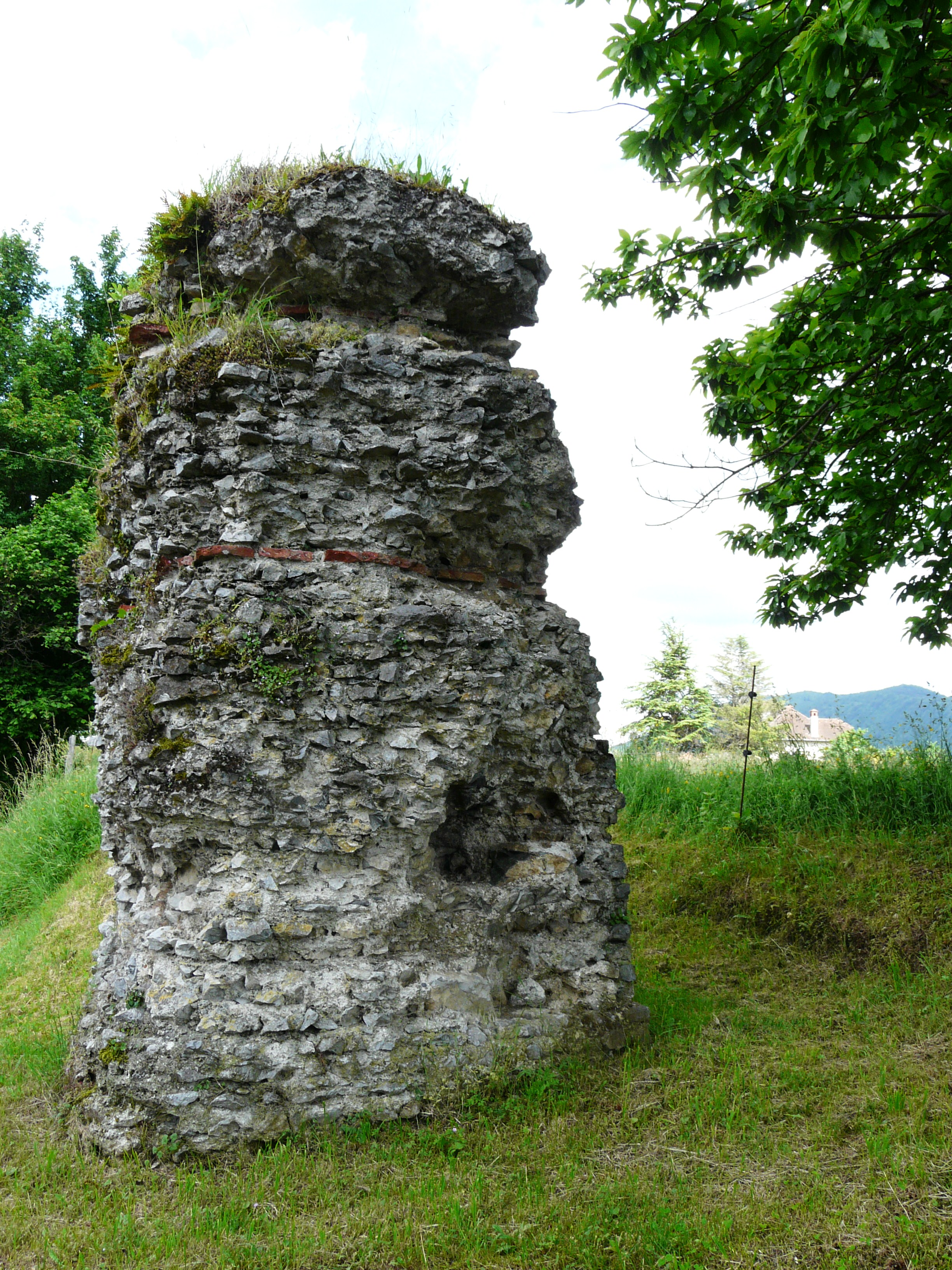 Vestiges d'une pile funéraire romaine en bordure de la route départementale 26, Valcabrère, Haute-Garonne, France.